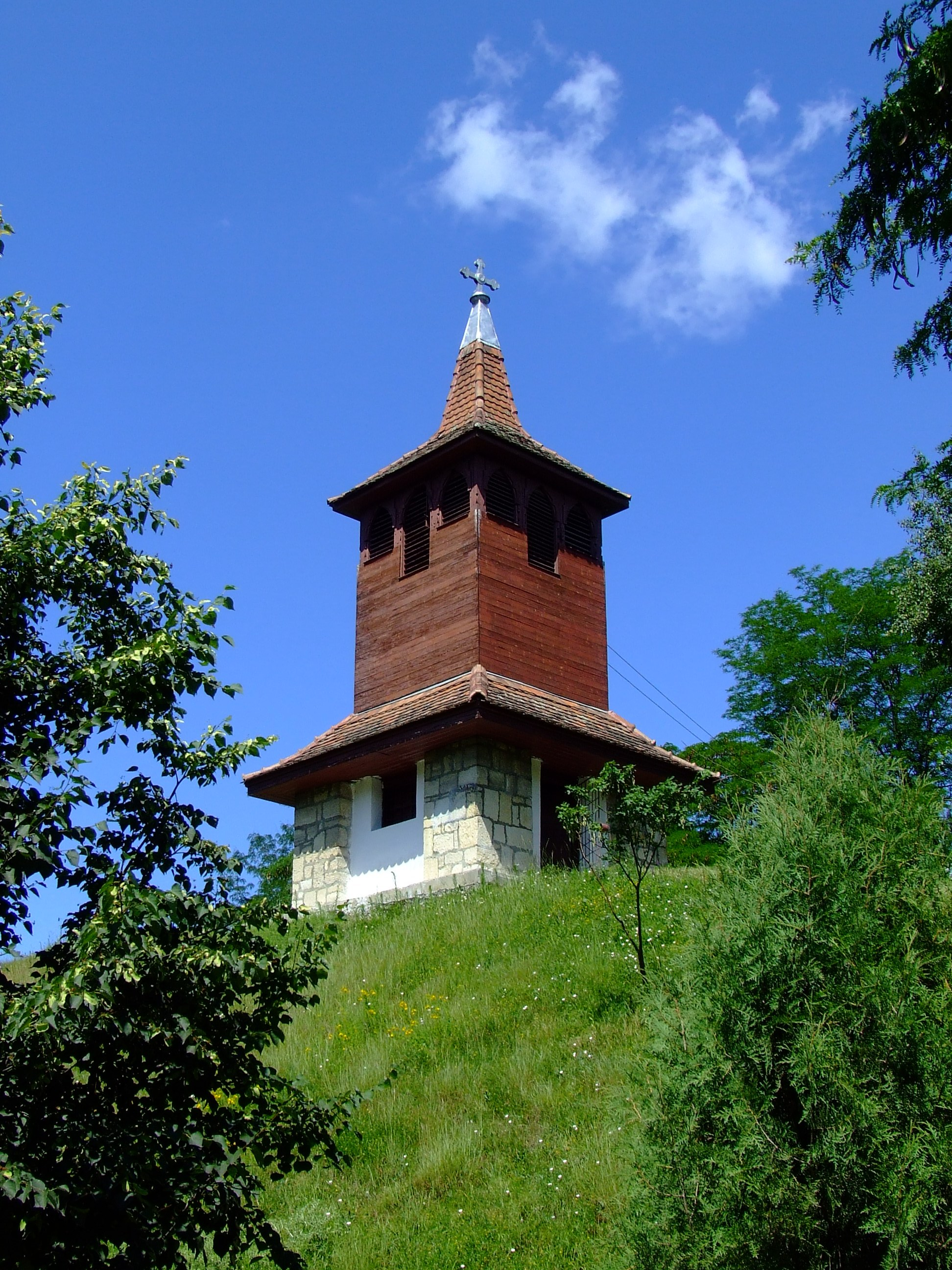 Harangláb a kolozsmonostori apátságnál (Kolozsvár). épült Kós Károly tervei alapján 1922-ben